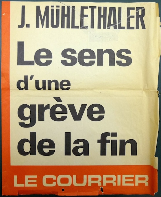 Manchette du quotidien genevois Le Courrier, du 16-17 octobre 1976.